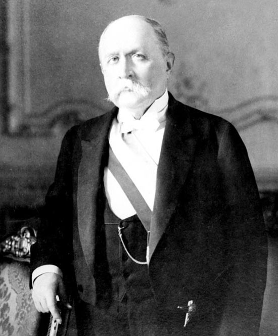 President Ramon Barros Luco (Chile)